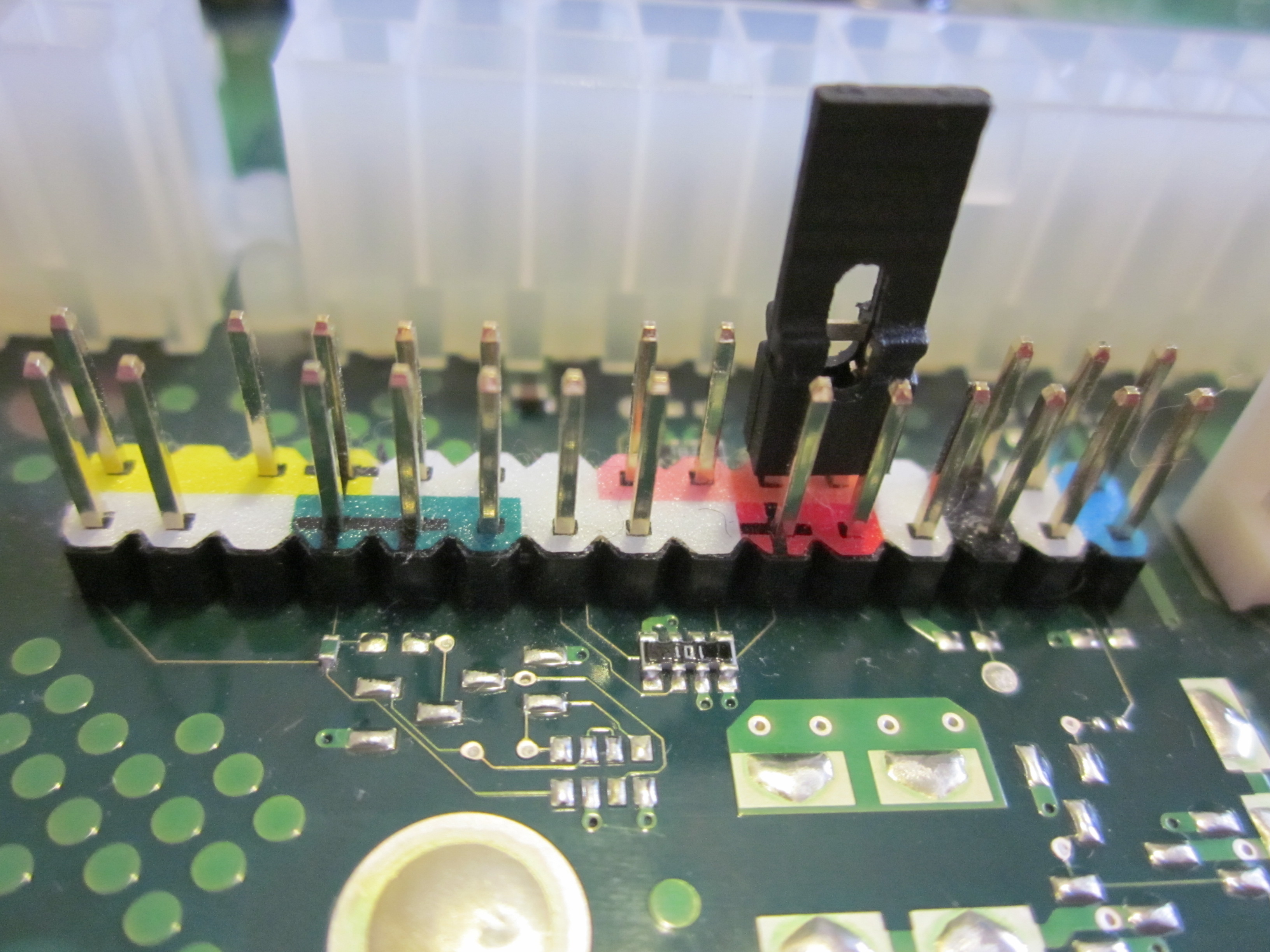 Emolevyn koteloliitinten pinnejä ja oikosulkupala.